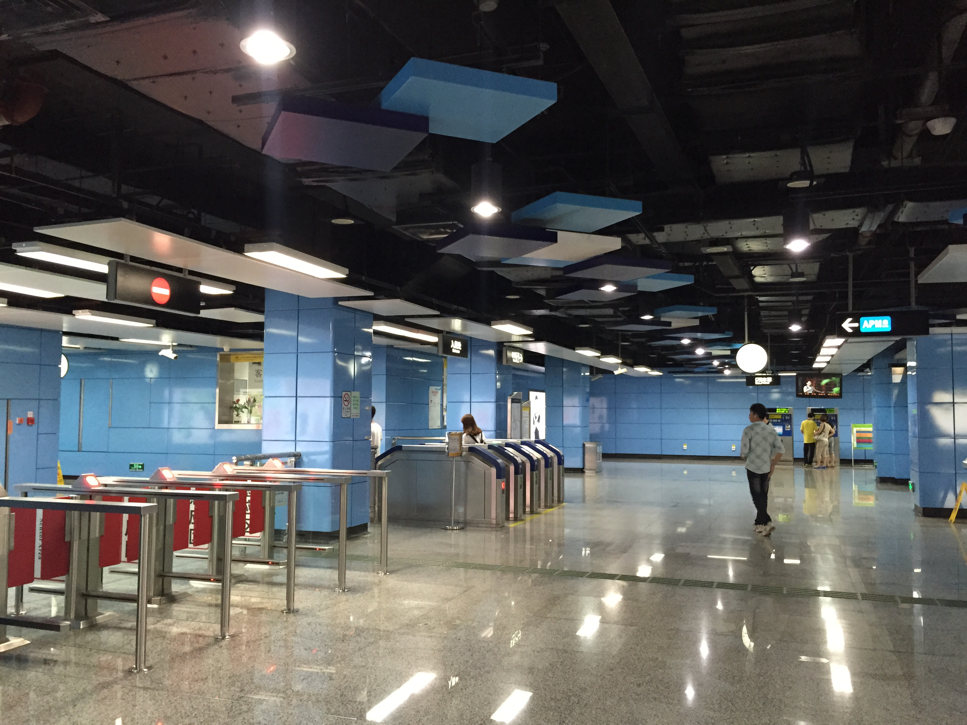 广州地铁海心沙站